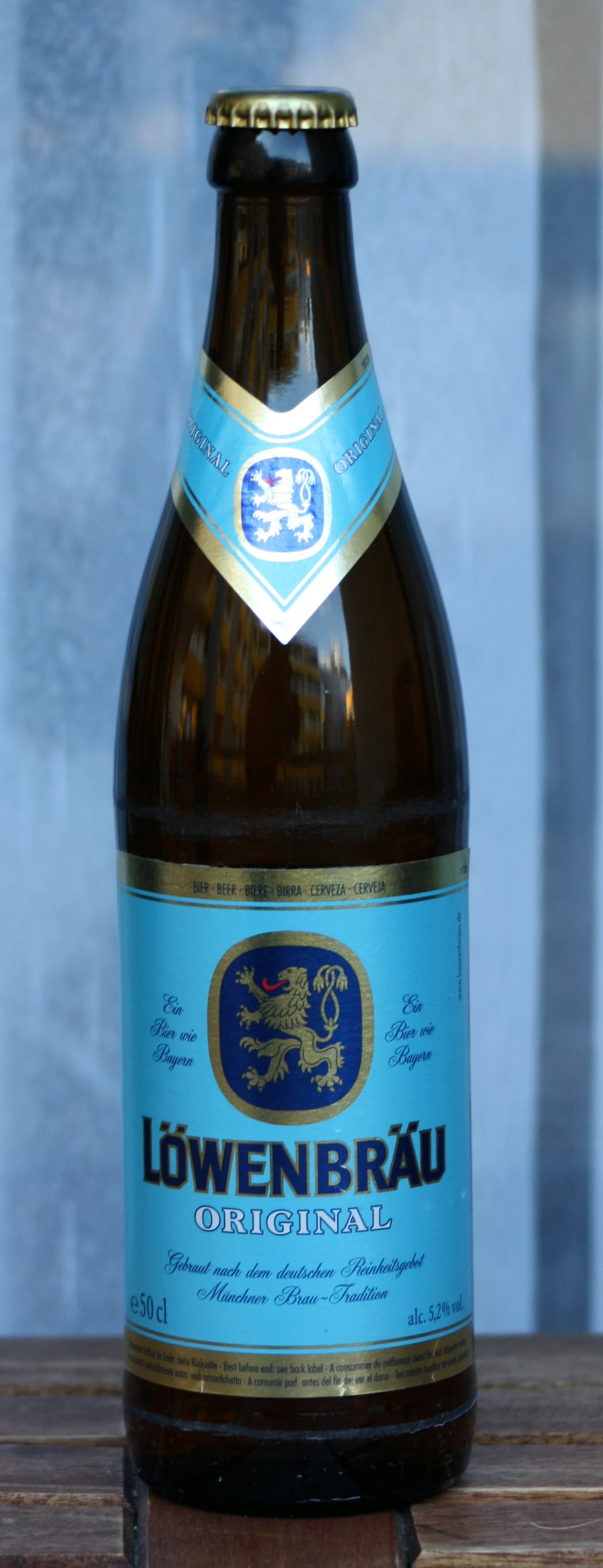 Bierflasche - Löwenbräu Brauerei AG - Helles, Alc. 5,2 % vol